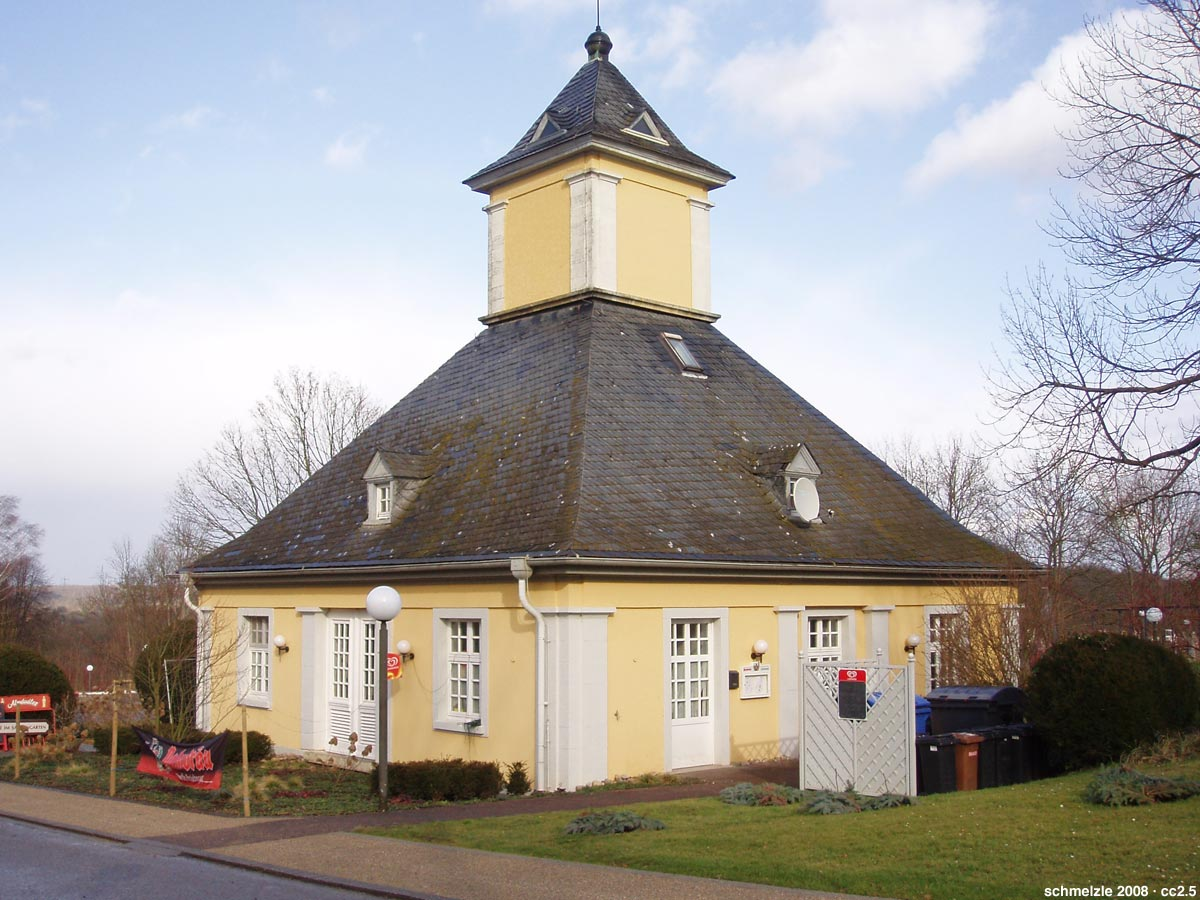 Trafostation (1925) der ehem. Saline in Bad Rappenau (heute Gastronomiebetrieb)